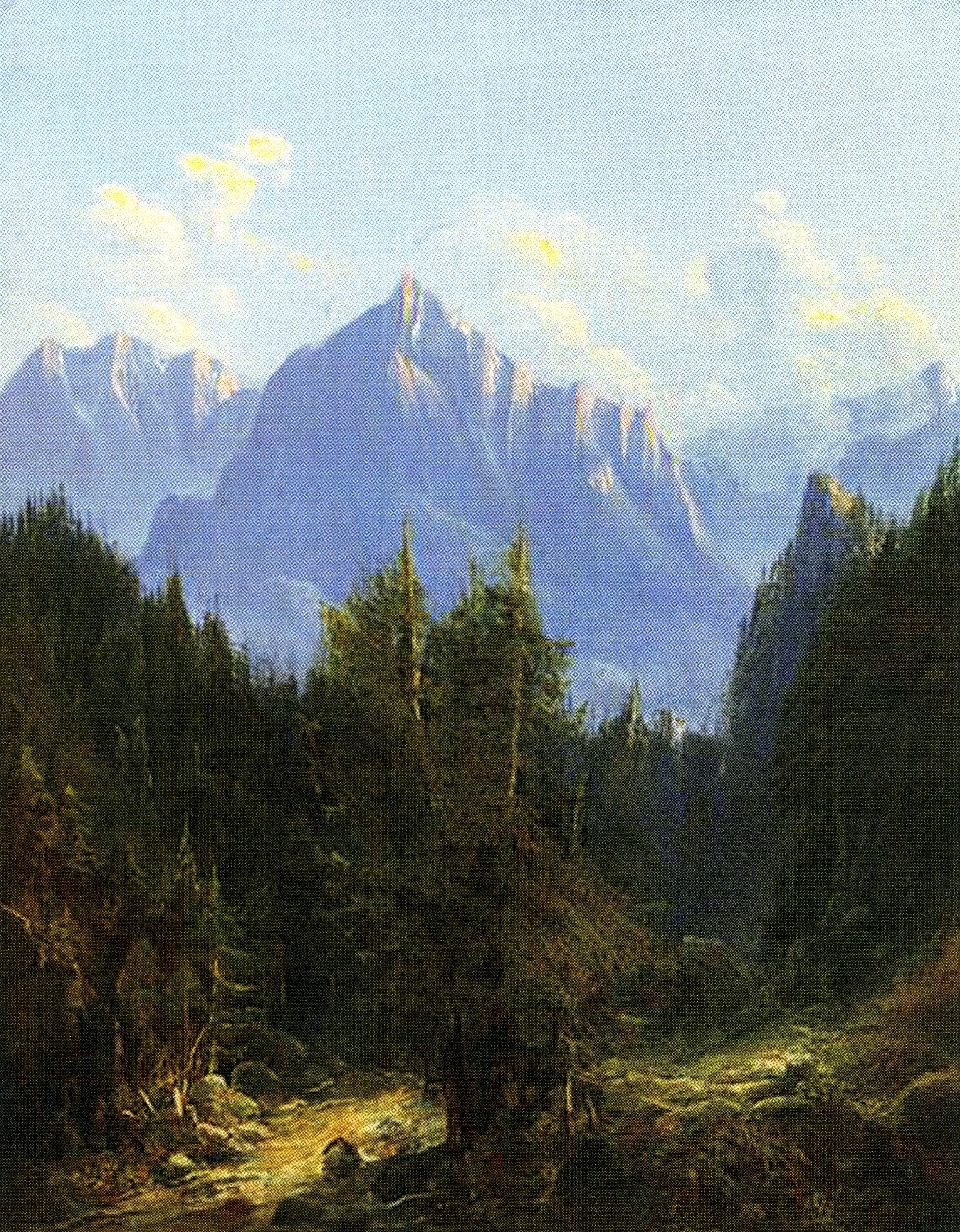 artysta: Adam Gorczyński (1805–1876); obraz olejny: Droga do Morskiego Oka (1850), Muzeum Narodowe w Krakowie MNK II-a-57